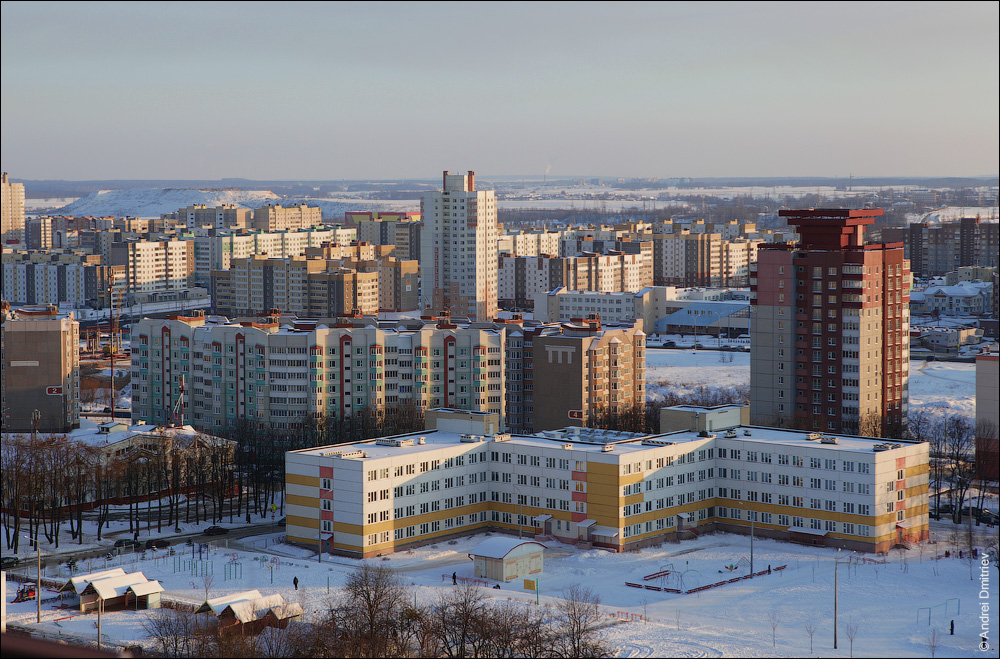 Лошыца